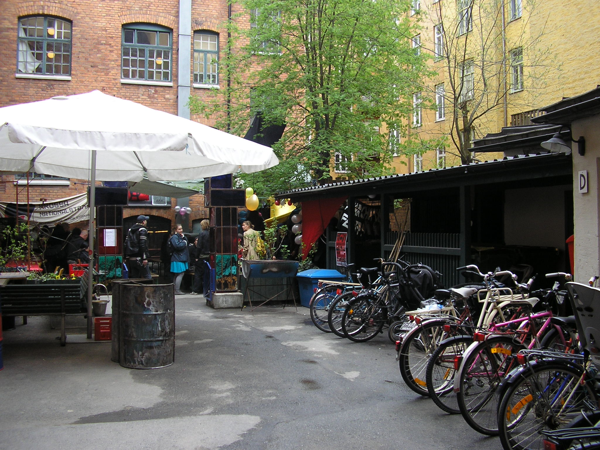 Inner yard at Kapsylen